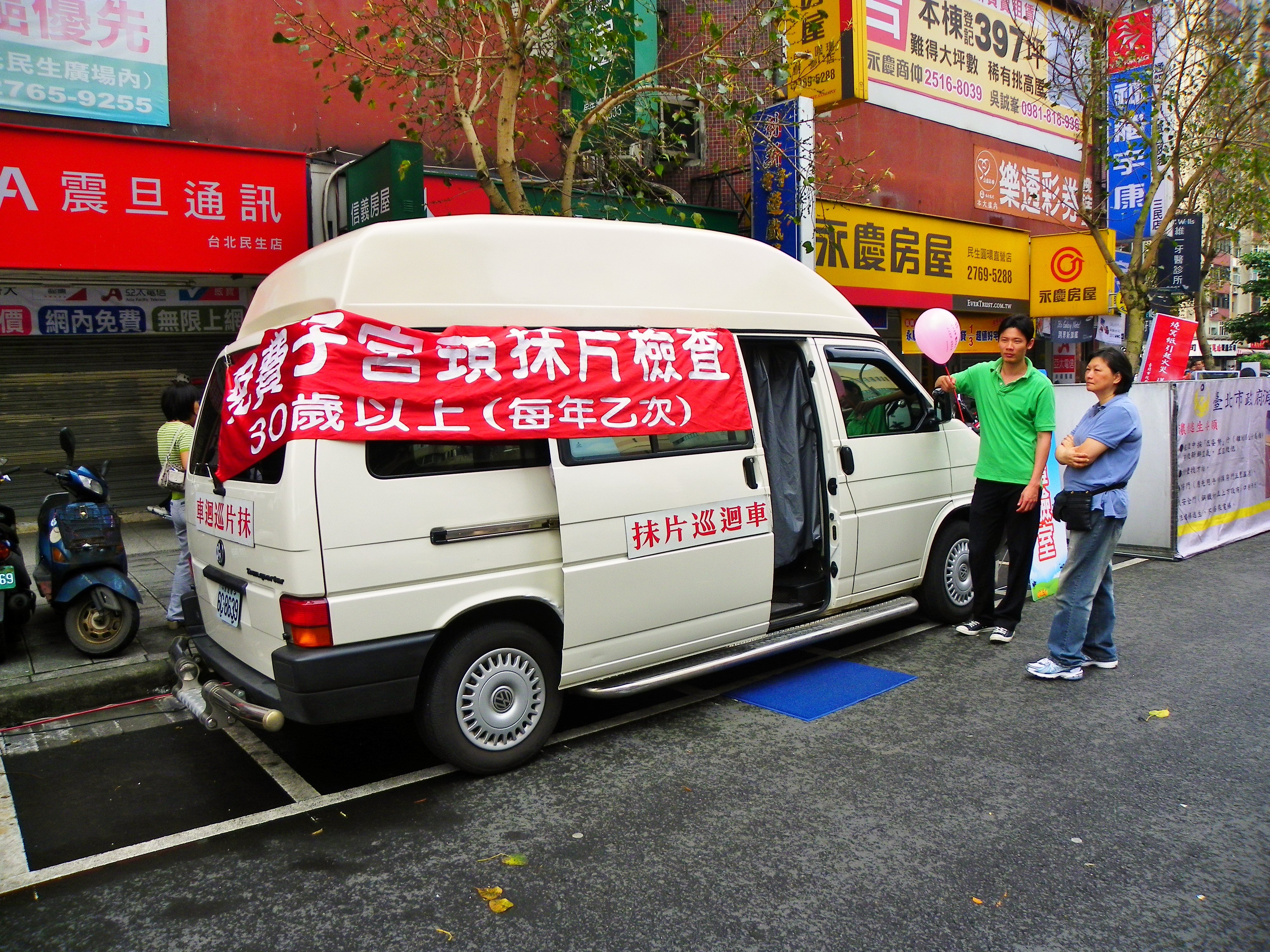 2012年臺北市政府消防局第三救災救護大隊民生社區防災宣導活動，提供免費子宮頸抹片檢查的抹片巡迴車。